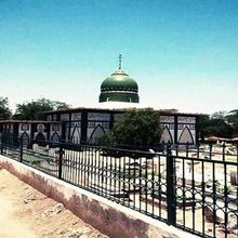 دربار عالیہ حبیب سلطانننگیانہ المعروف نانگا سرکارؒ